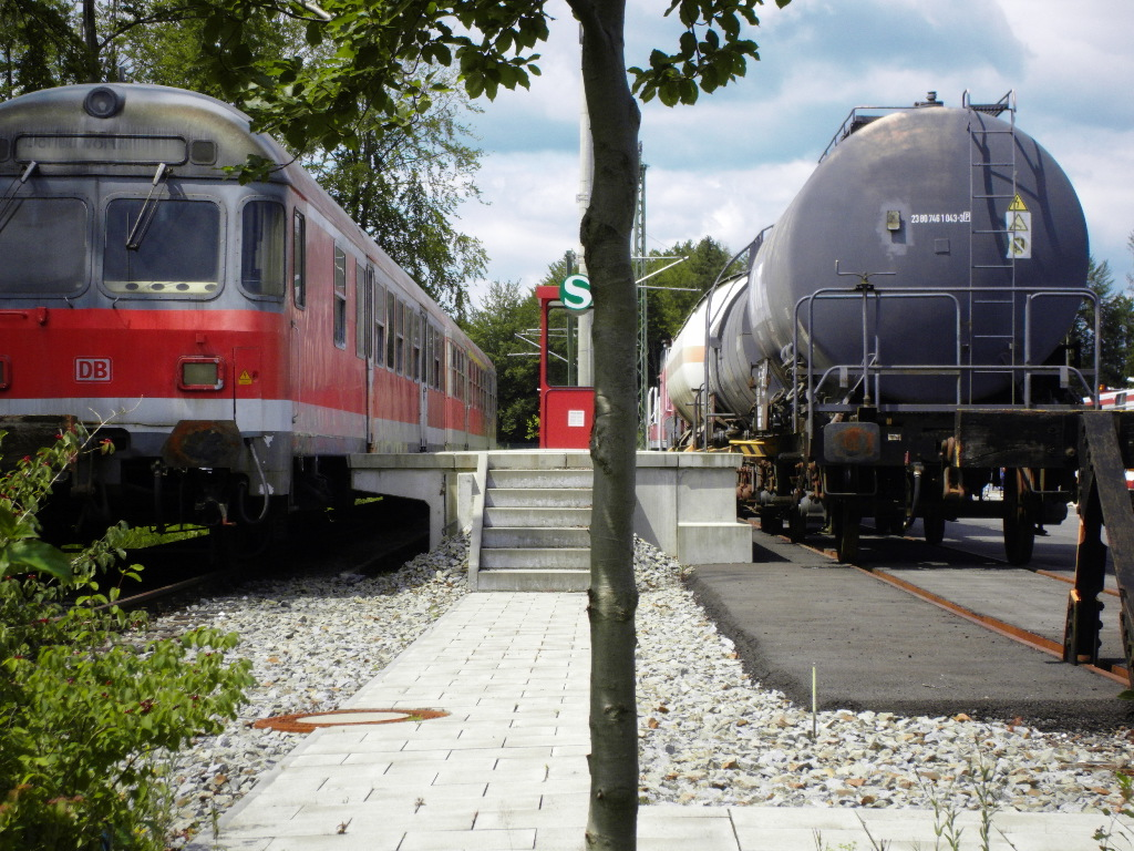 Staatliche Feuerwehrschule Geretsried (Zoom)